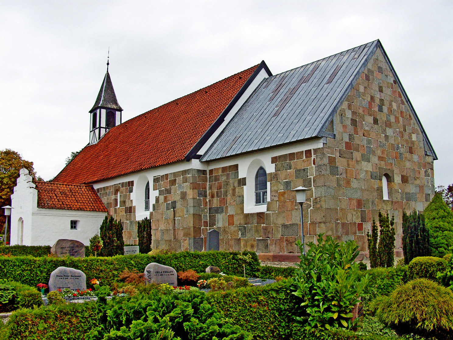 fra sydøst